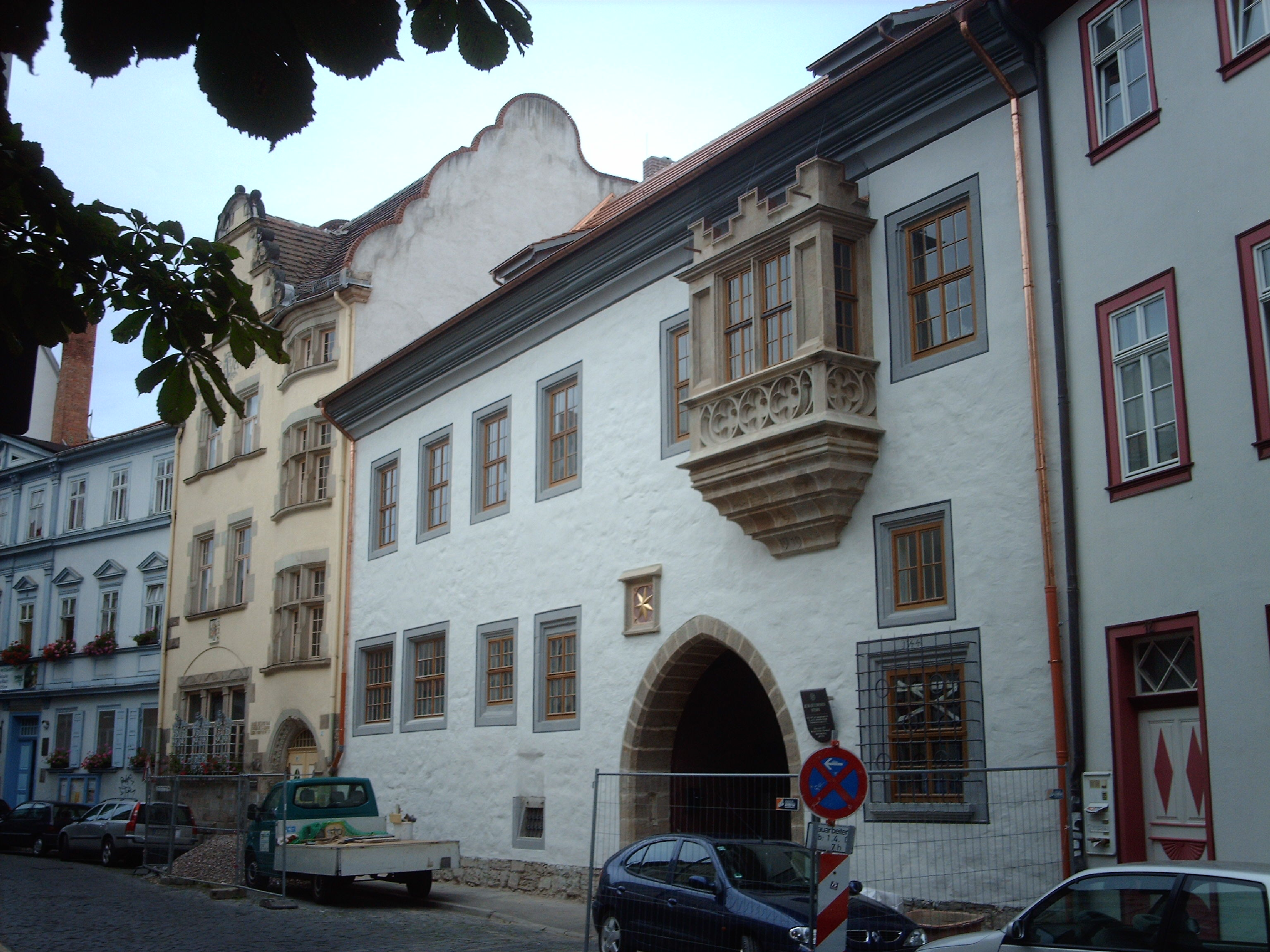 Das Haus Zum Güldenen Stern in Erfurt, Allerheiligenstraße 11.